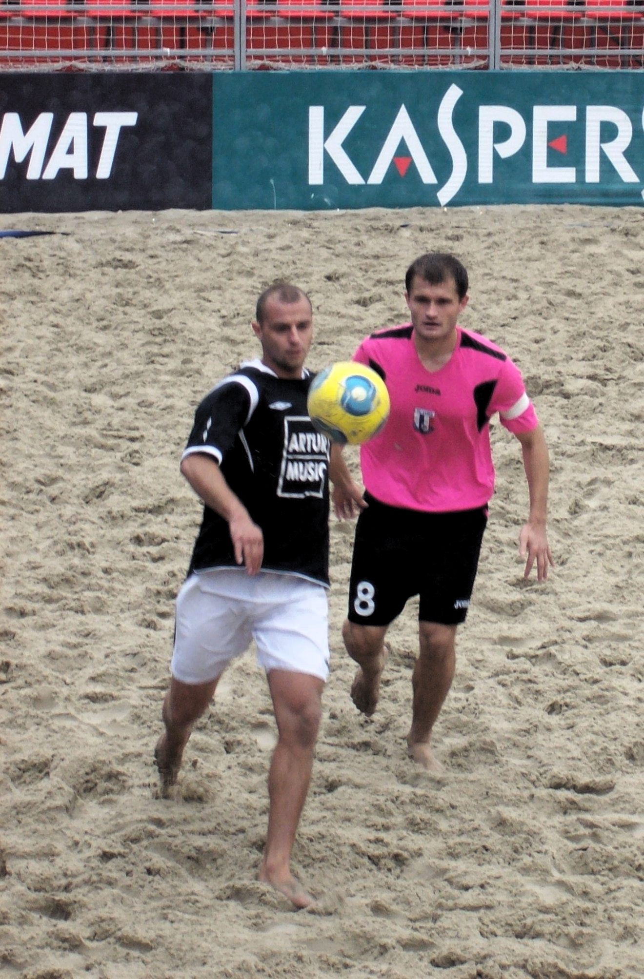 Півфінал українського чемпіонату з пляжного футболу. Олег Мозговий (чорно-біла форма, "Артур-М'юзік" Київ) і Андрій Черевко (рожево-чорна форма, "Вибір" Дніпропетровськ)